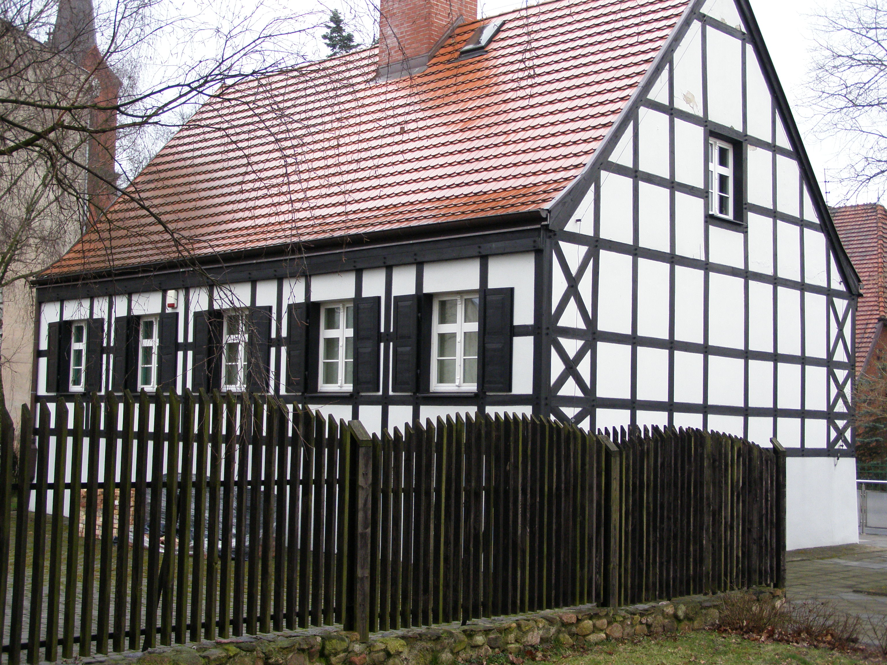 Piła - Dom Staszica (zabytek nr rejestr. A-121)